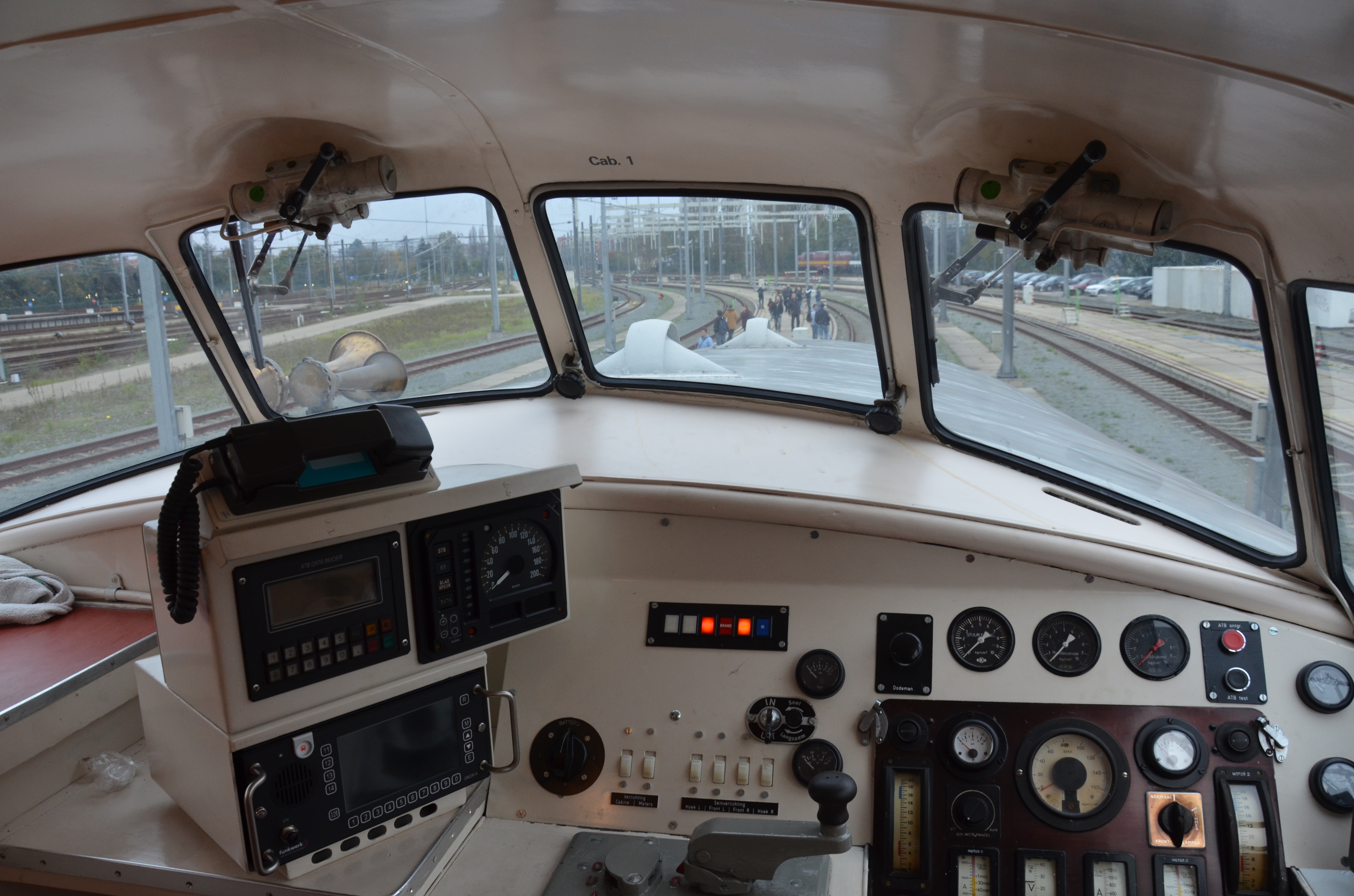 Het interieur van het motorrijtuig NS 20, bijgenaamd de Kameel.